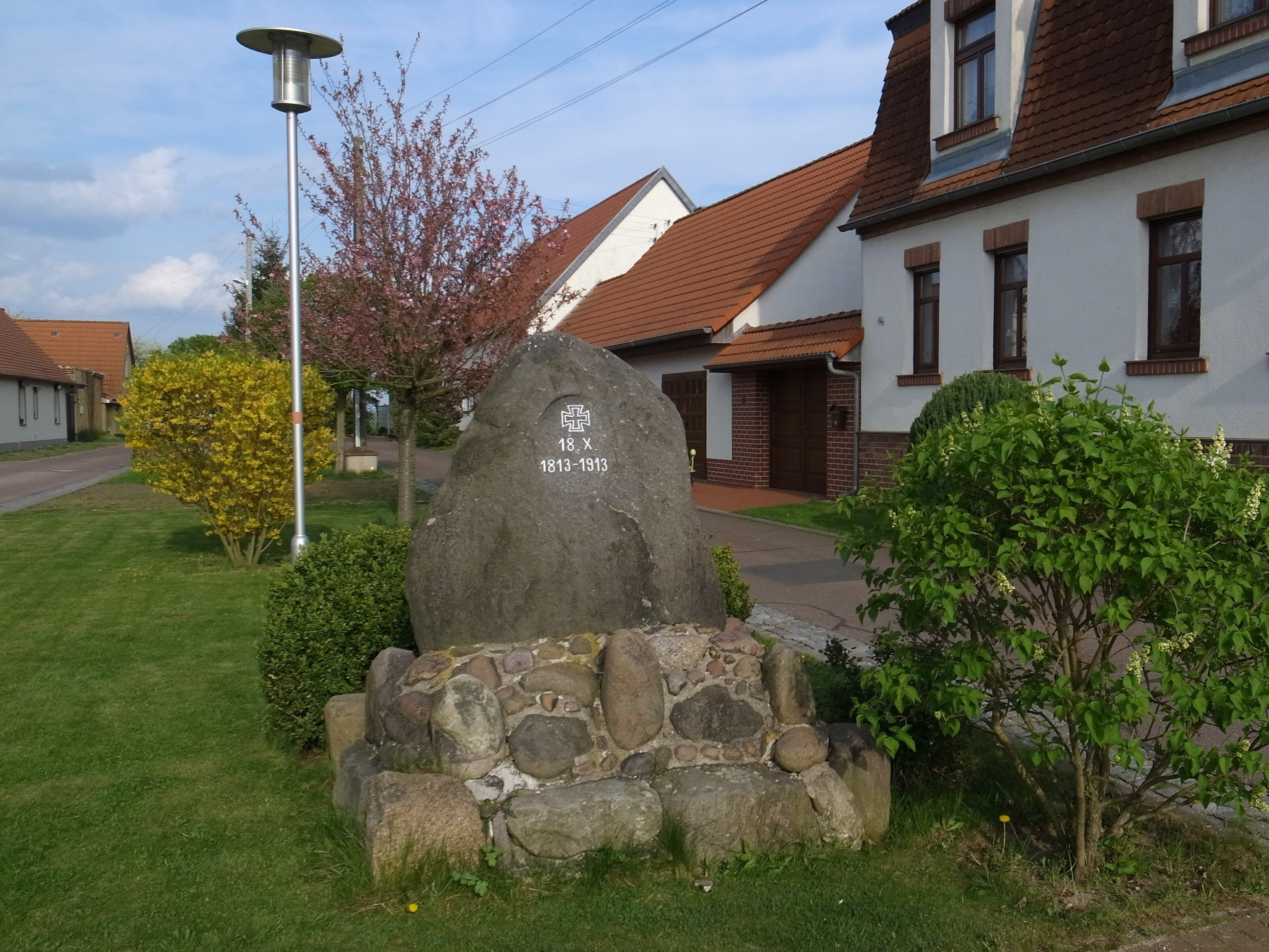 Fraßdorf, Gedenkstein 1813-1913